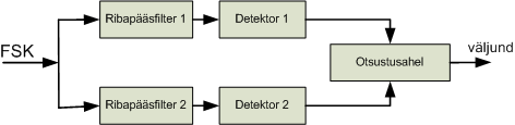 Asünkroonse FSK demodulaatori blokkskeem